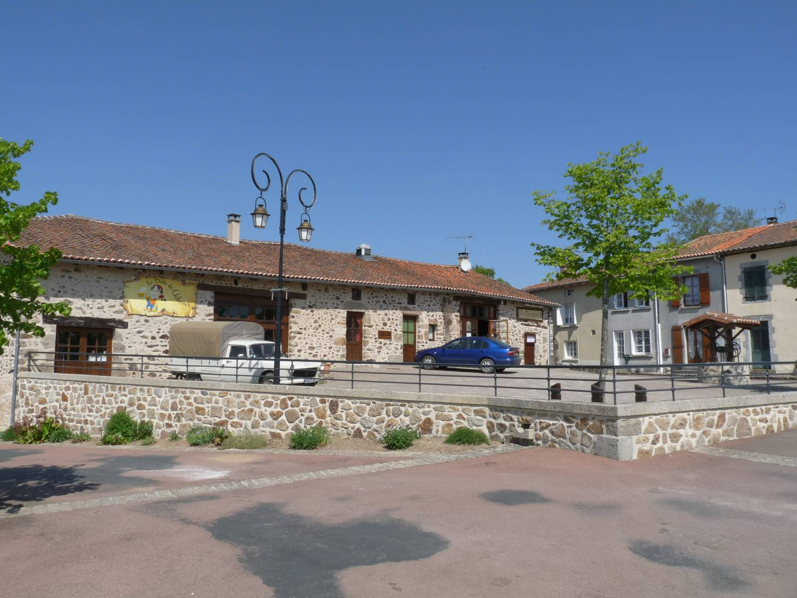 Commerces à Esse, Charente, France